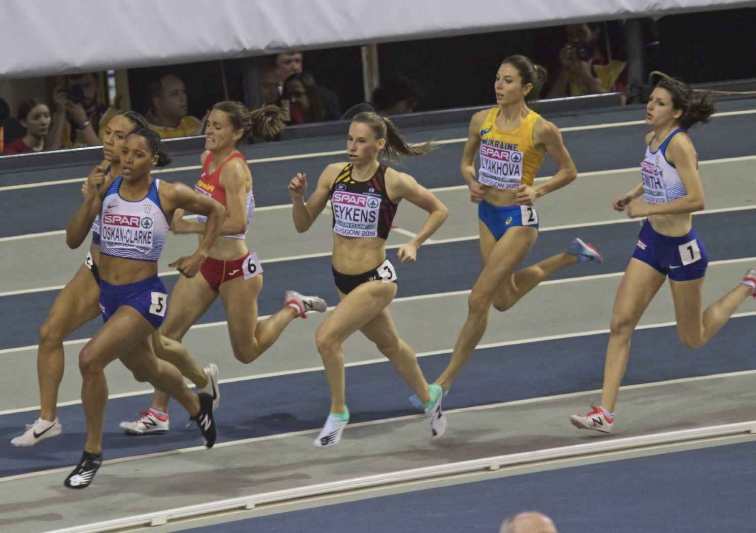 EKI30445 finale 800m dames eykens